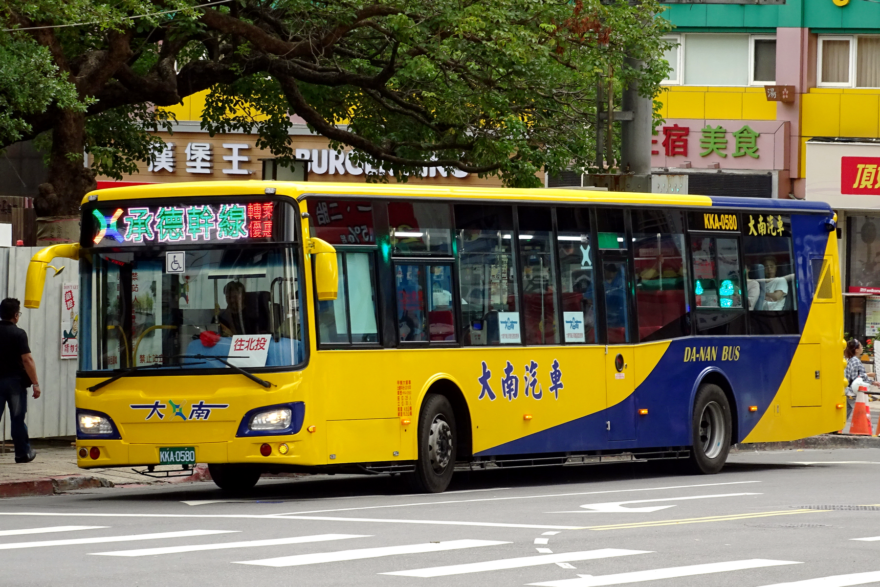 中文（台灣）: HINO - HS8JRVL - KKA-0580